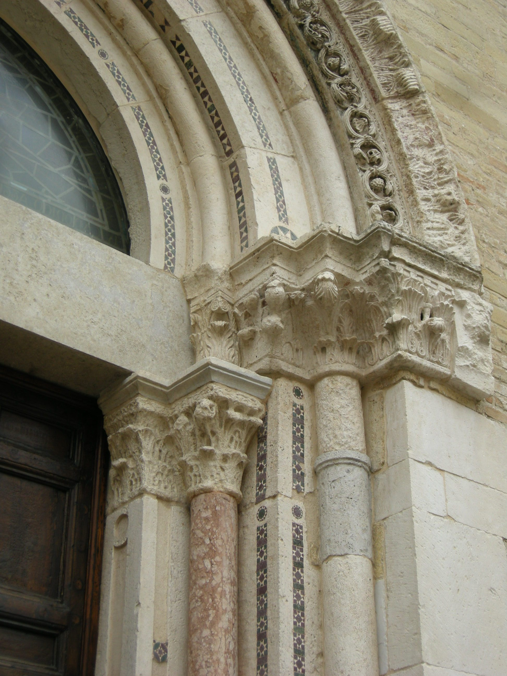 Fano, duomo, facciata